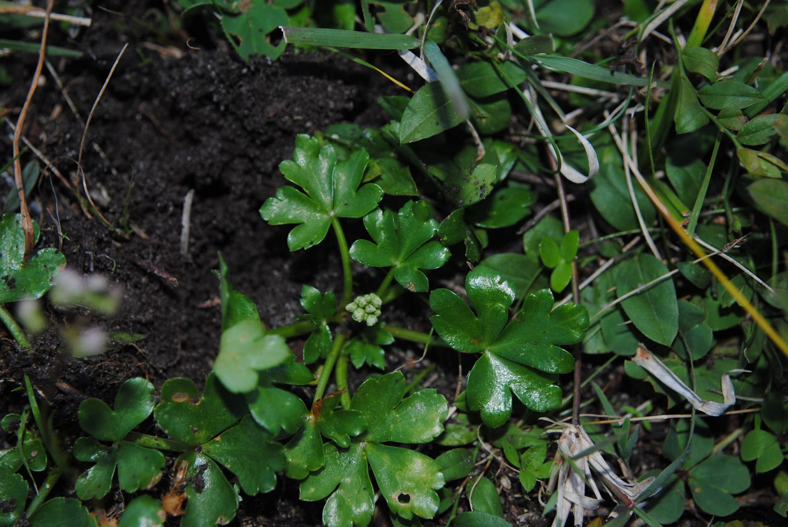 Diposis saniculaefolia. Apiaceae. Fotos tomadas en ladera pedregosa de pequeño cerro cercano a Palmar, departamento de Soriano, Uruguay. Compartidas en por Andrés González, permiso dado en